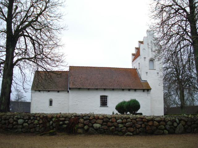 Blegind Church / Blegind Kirke, Jutland, Denmark